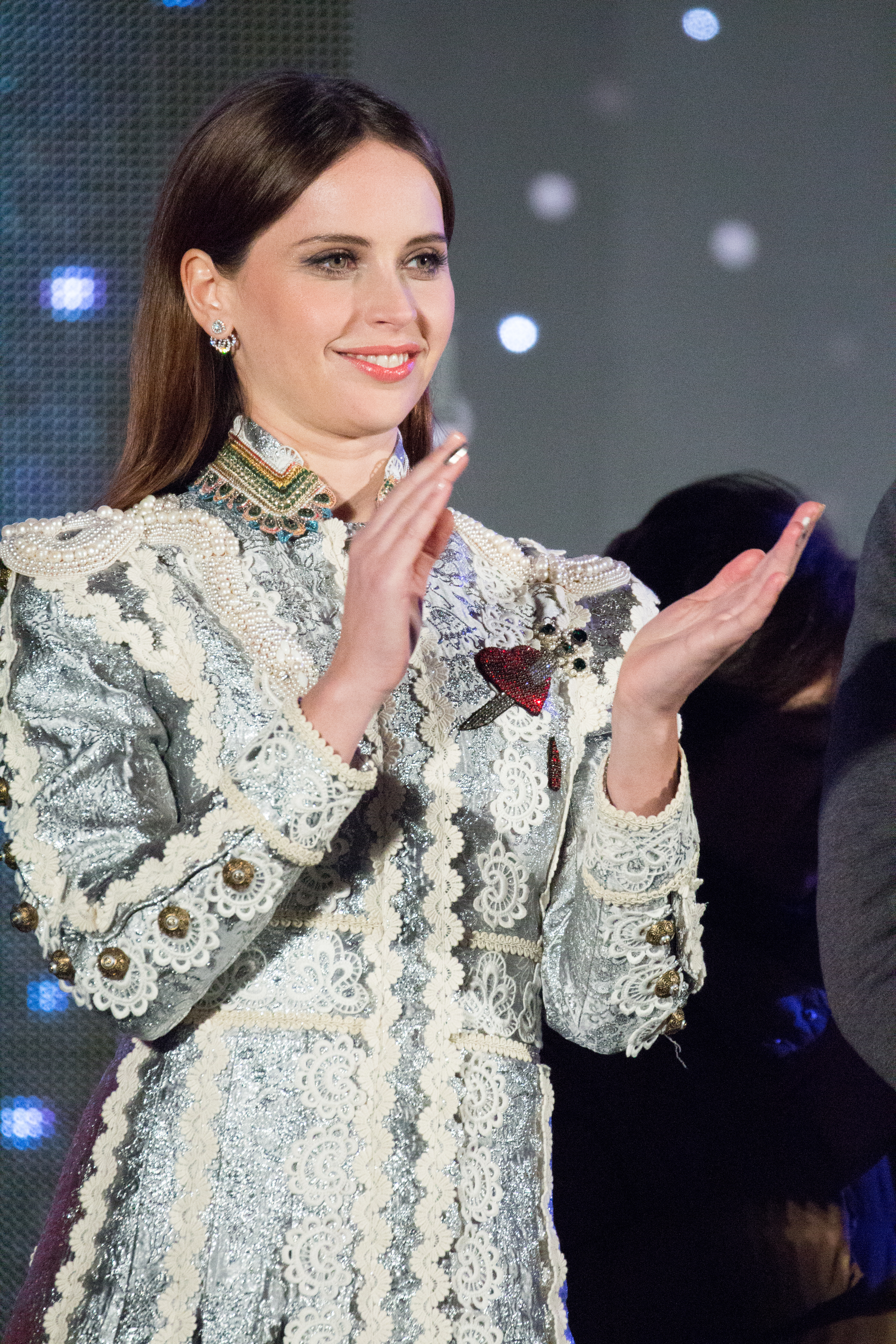 ローグ・ワン/スター・ウォーズ・ストーリー ジャパン・プレミア レッドカーペット フェリシティ・ジョーンズ